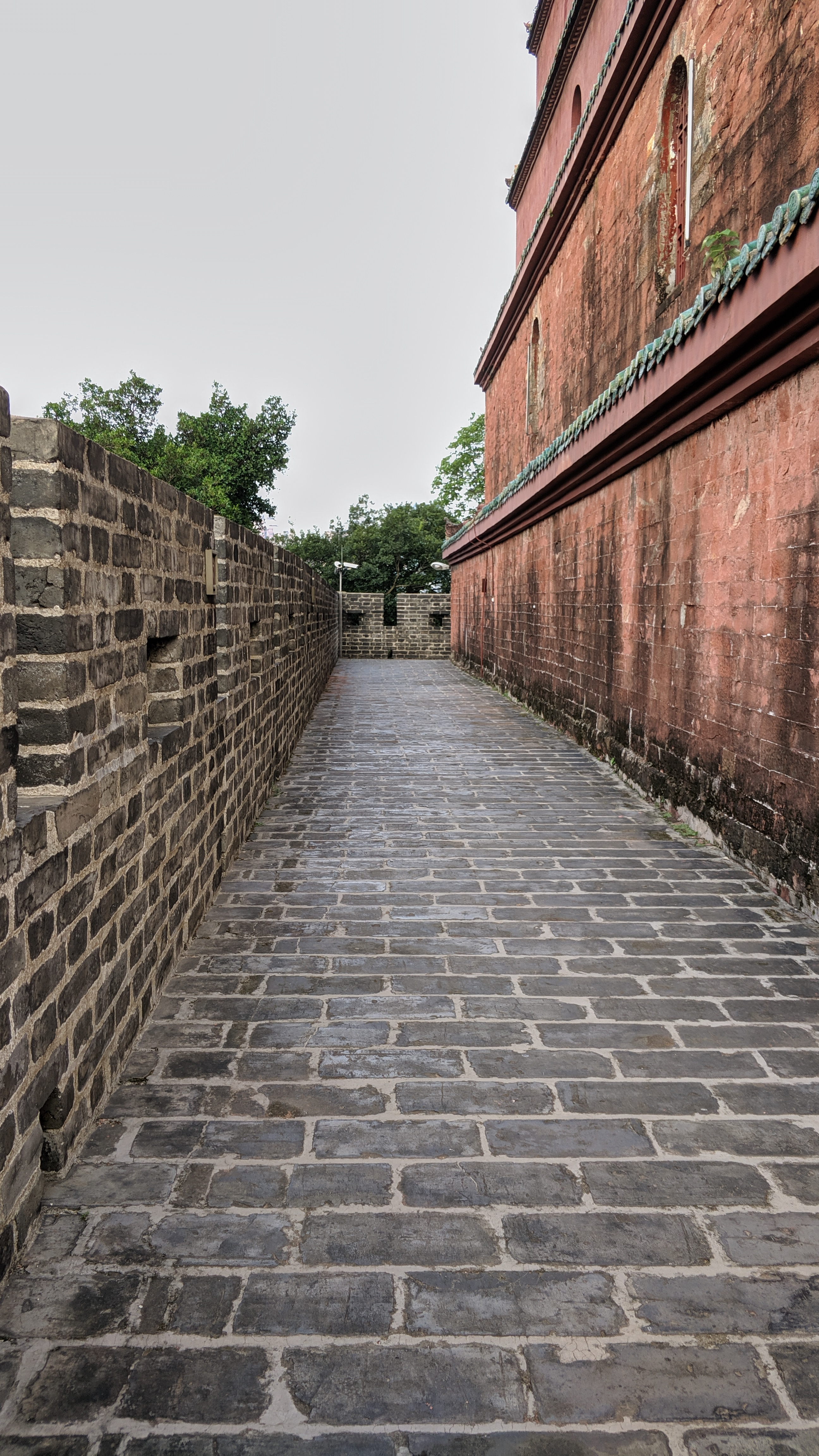 广州望海楼背后古围墙